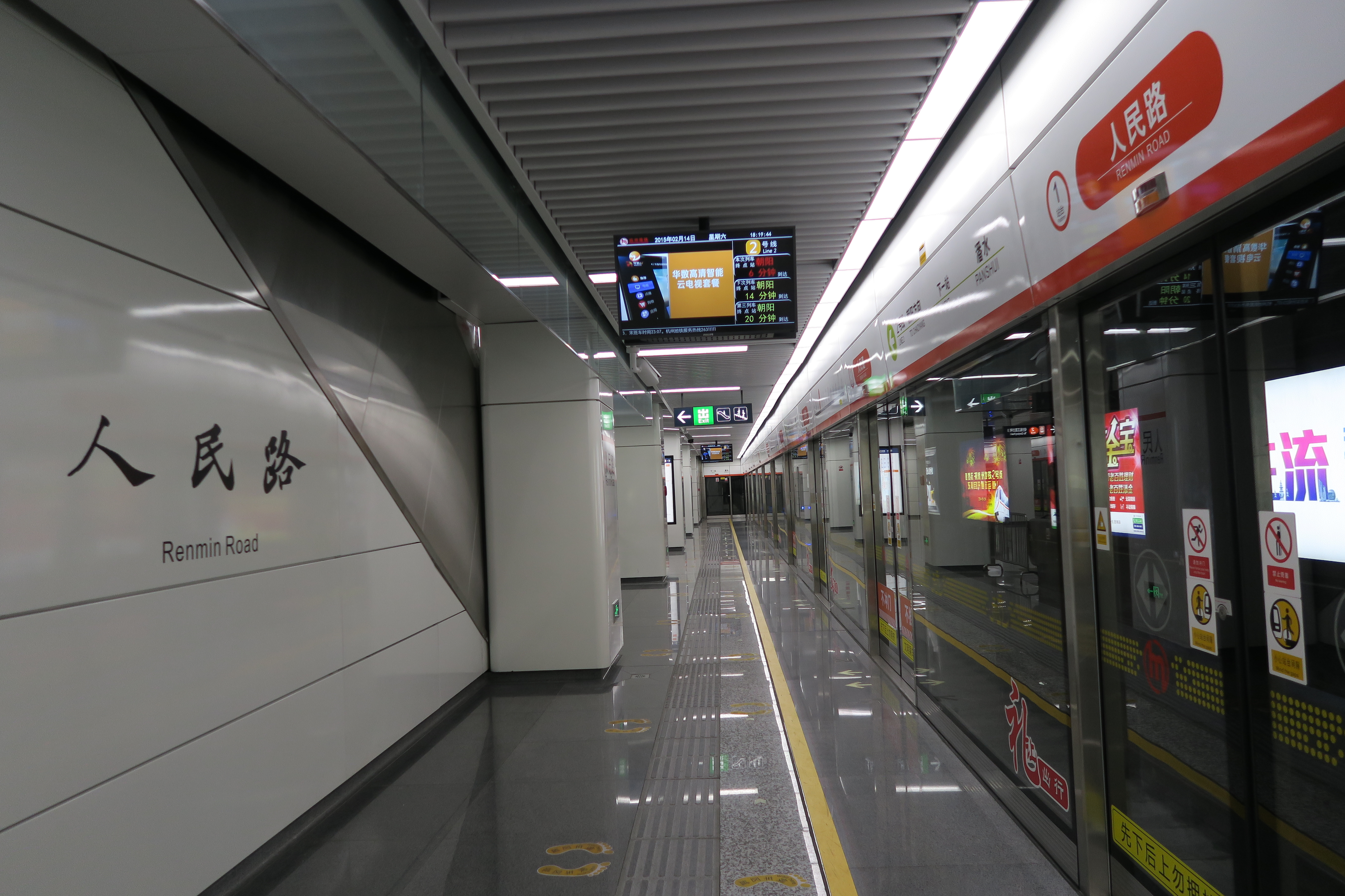 杭州地铁人民路站